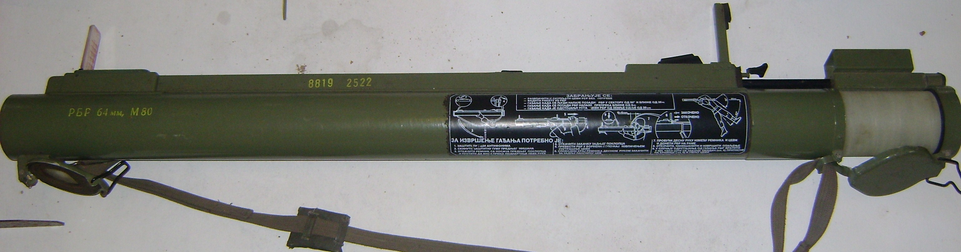 M80 Zolja Panzerabwehrrohr